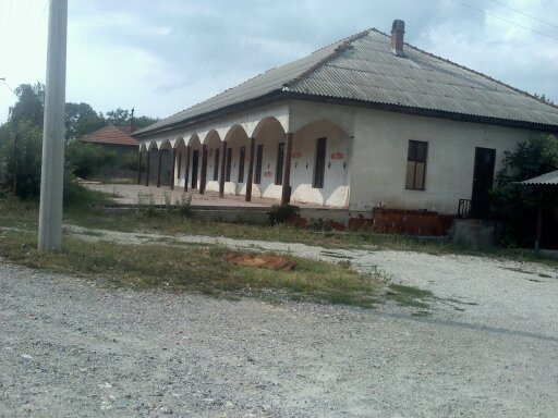 Menzulana u Brzanu, na Carigradskom drumu.